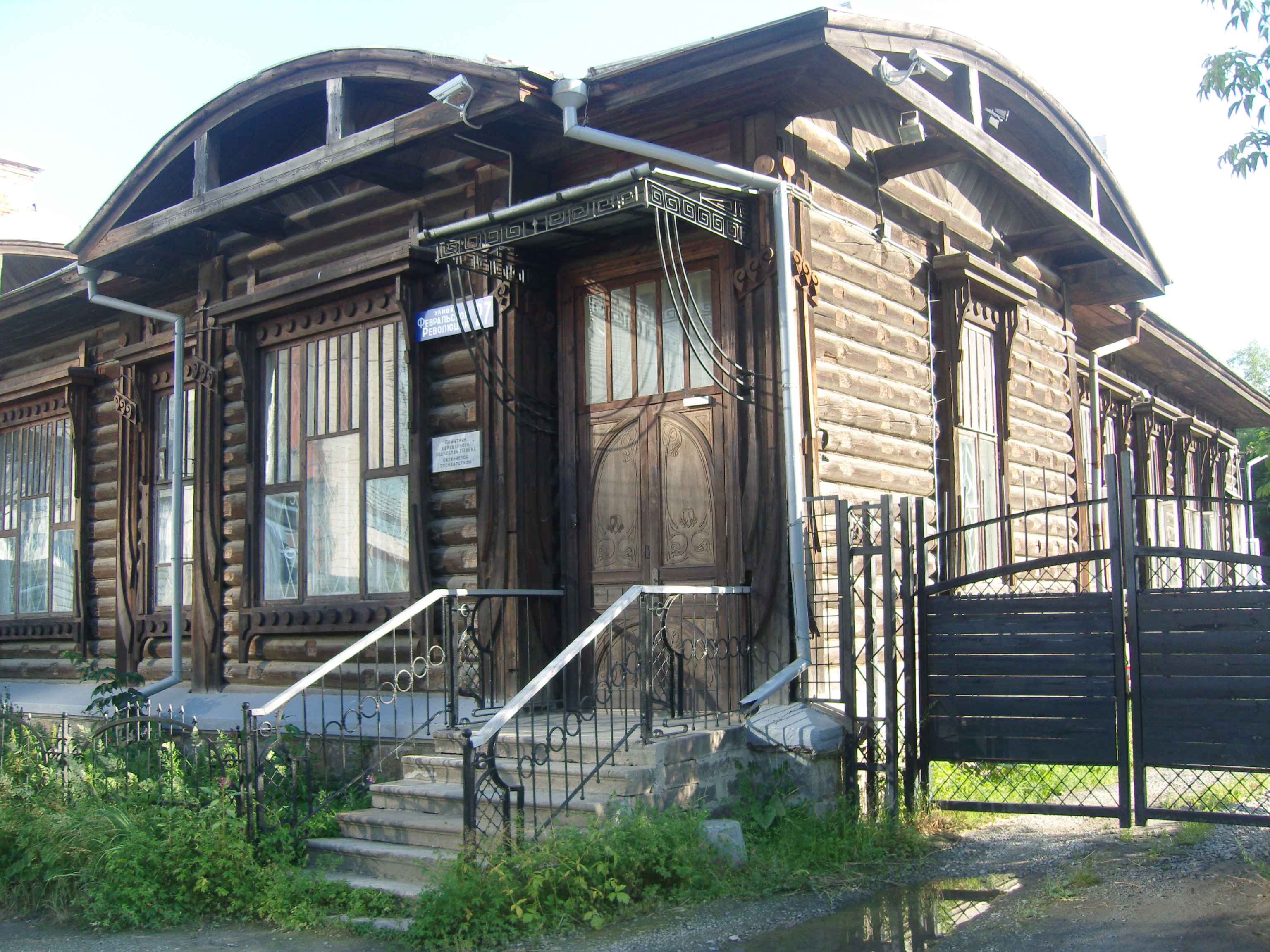 Жилой дом, нач. XX века.